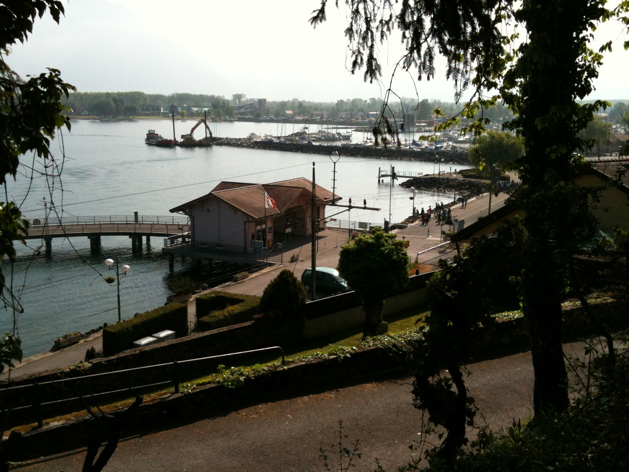 Boothof in Le Bouveret, Kanton Wallis (direkt am Genfersee gelegen)